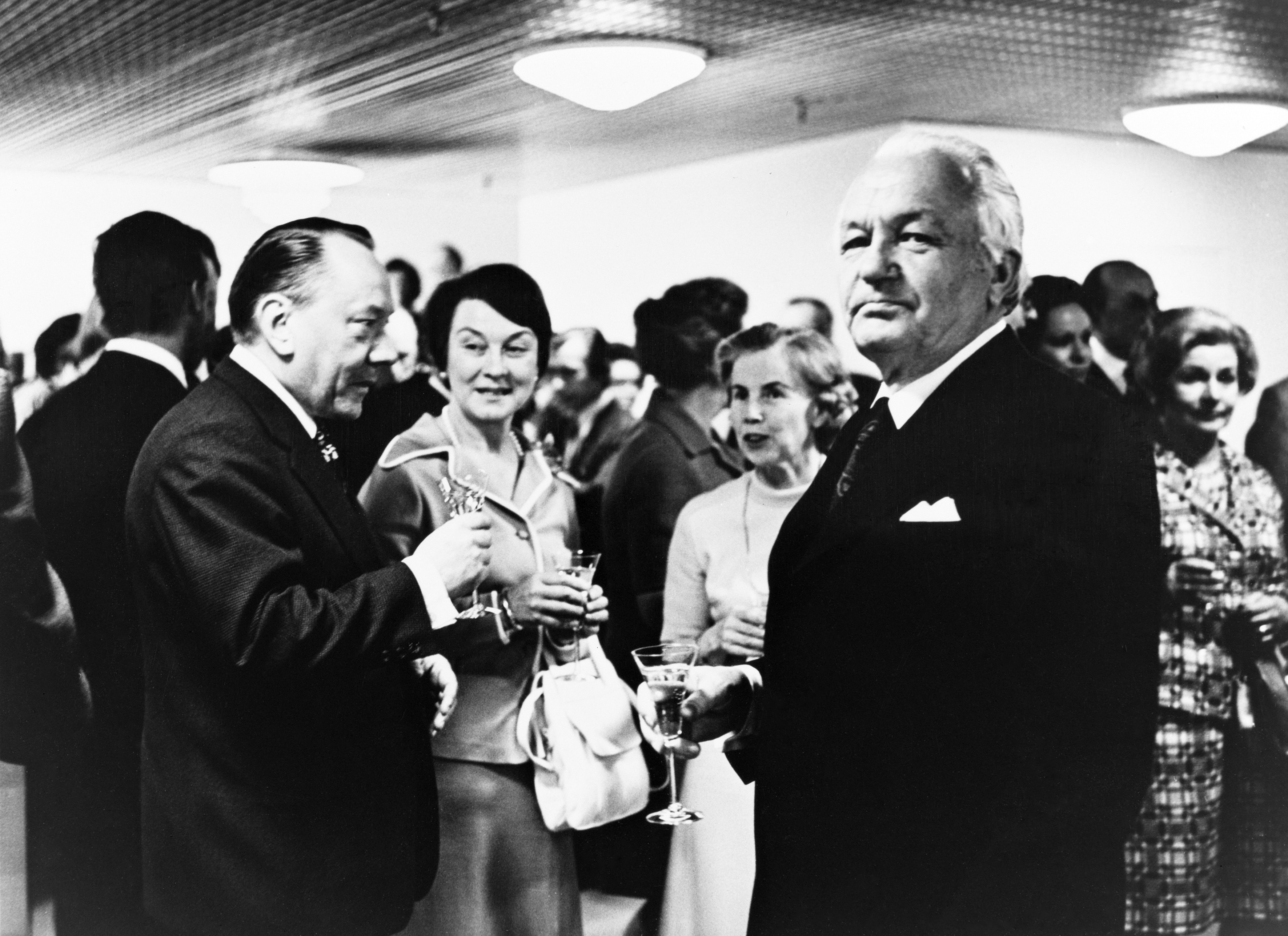 Finlandia-talon kongressisiiven vihkiäistilaisuus. Kutsuvieraat: vas. kvston puheenjohtaja päätoimittaja Pentti Poukka, FM E. Poukka ja eduskunnan puhemies V.J. Sukselainen.